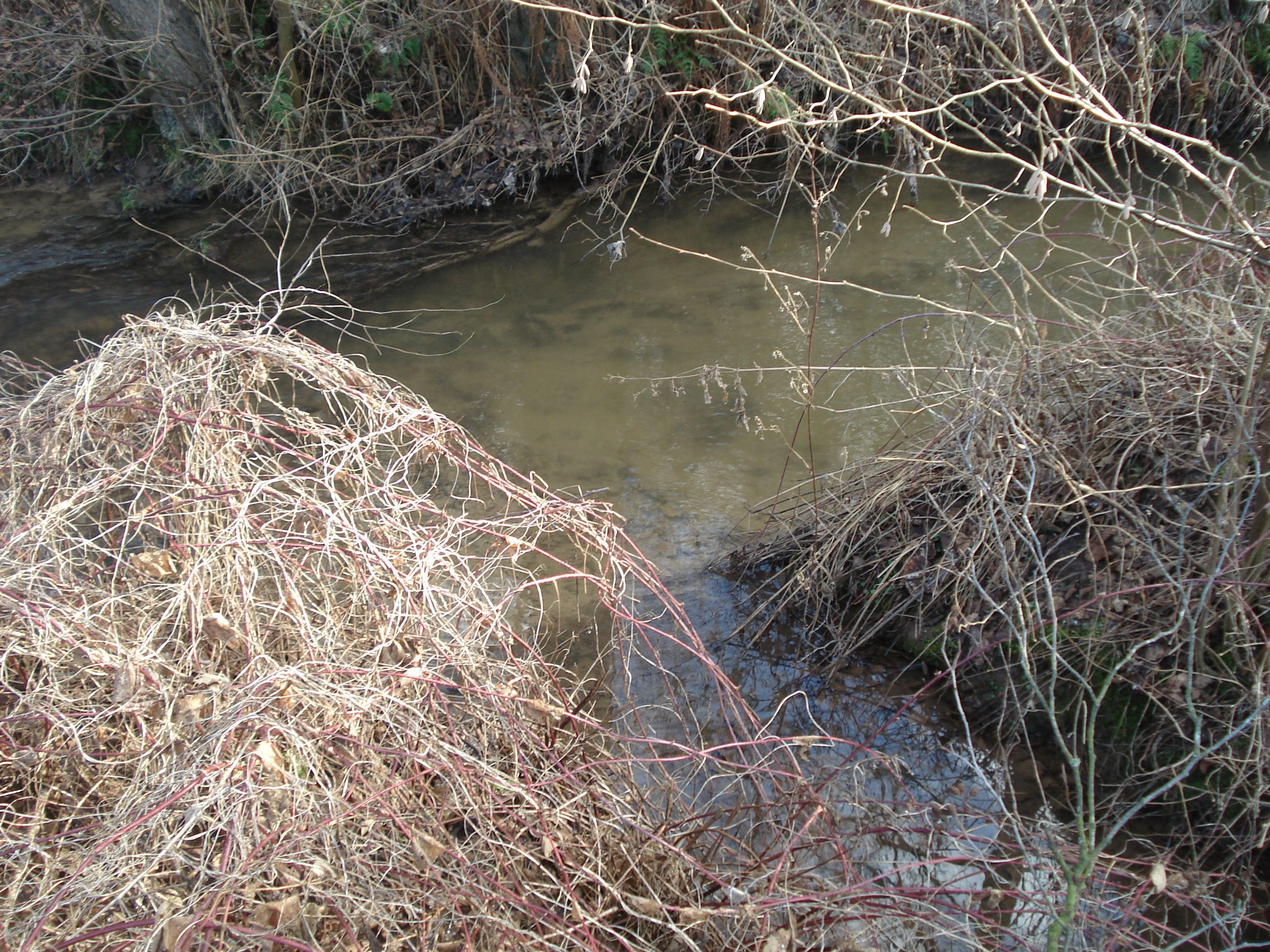 Der Wendelsgraben (vorne) mündet in den Aubach (v. rechts n. links)